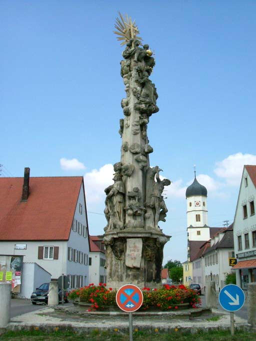 Image personnelle - Août 2003